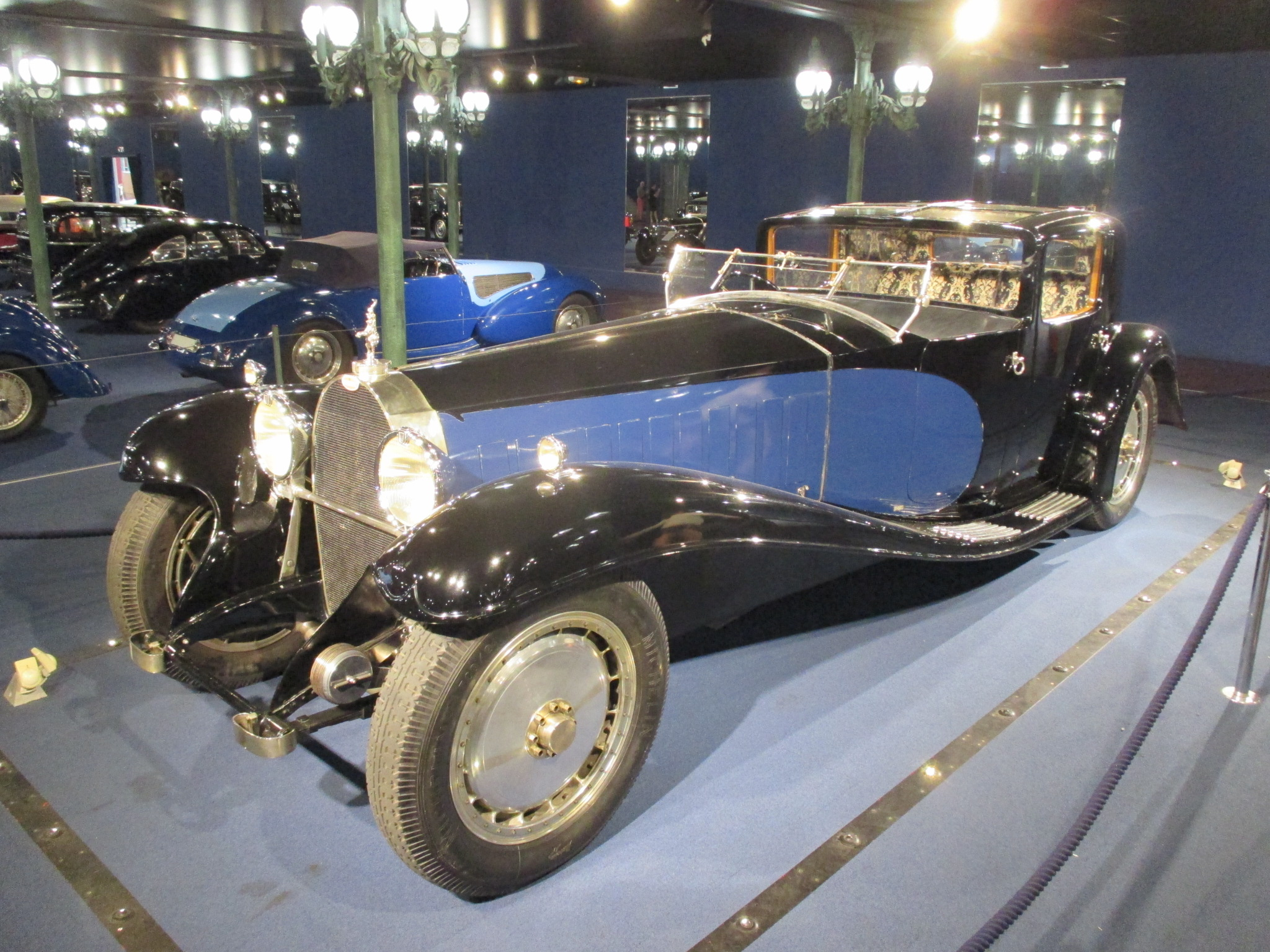 Bugatti Type 41 Royale Coupe in the Musée National de l'Automobile